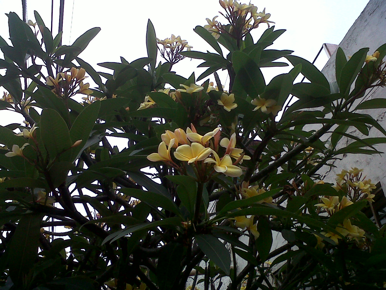 Árbol de Chagualo en el barrio del mismo nombre, Medellin, Colombia